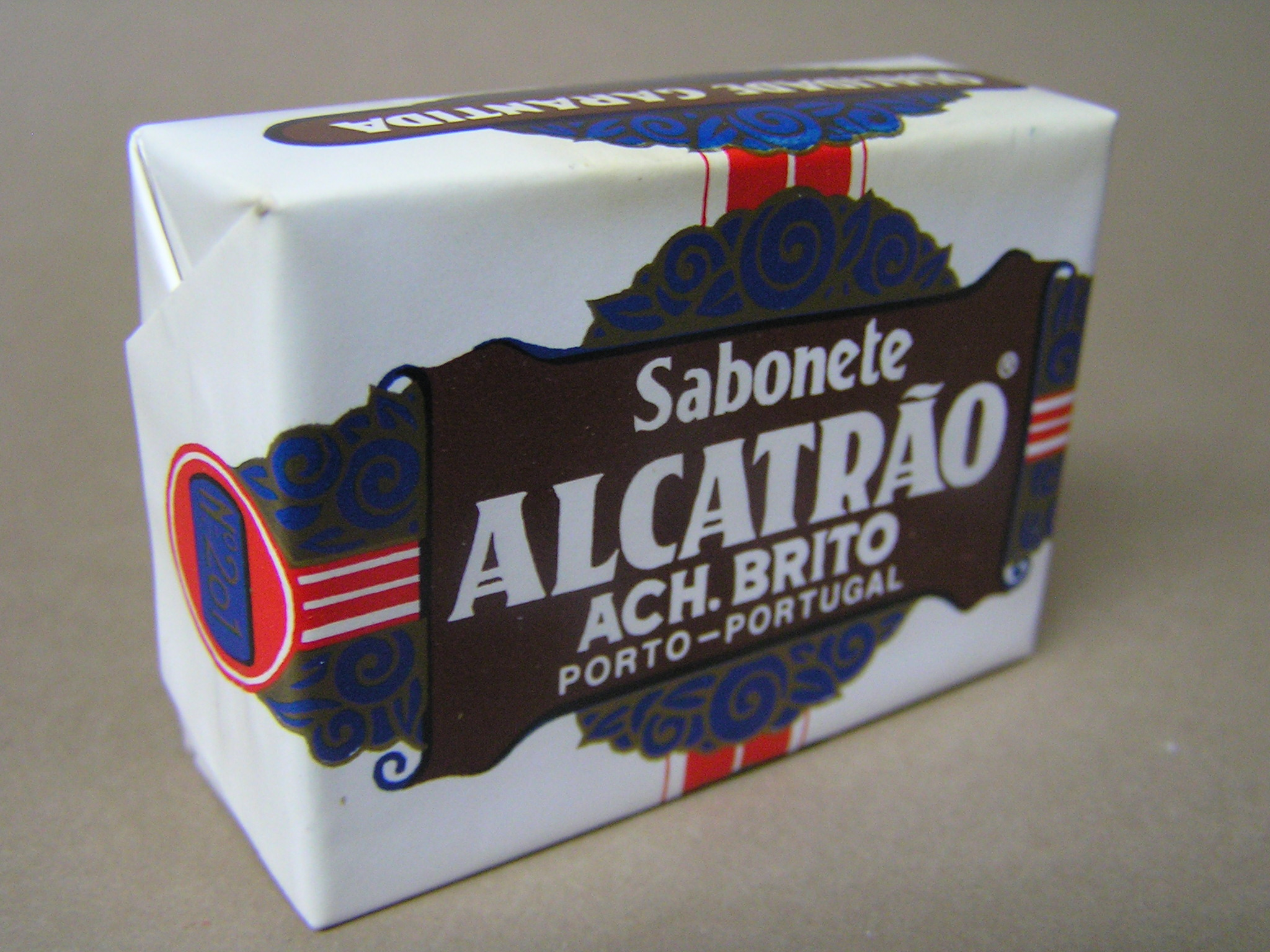 Sabonete Alcatrão (um produto antigo) da marca Portuguesa Ach. Brito